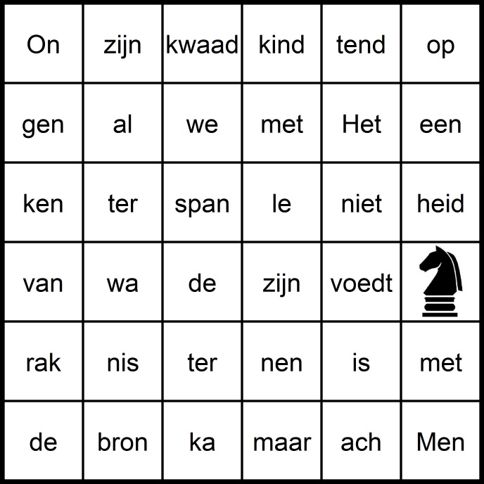 Onwetendheid is de bron van alle kwaad.(Socrates) Het paard achter de wagen spannen Men voedt een kind niet op met zijn kennis maar met zijn karakter (L. Arréat)